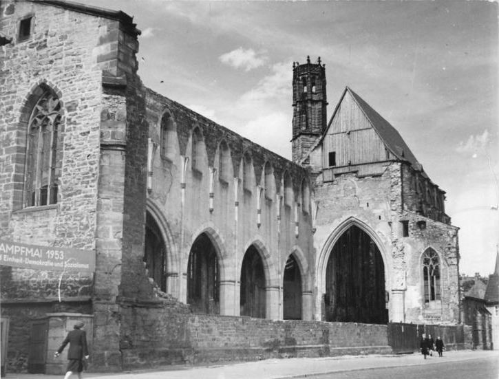 Factual corrections and alternative descriptions are encouraged separately from the original description. Additionally errors can be reported at this page to inform the Bundesarchiv. Original historic description: Erfurt, Barfüßerkirche, Ruine Zentralbild Klein-3.6.1955 Ra-Ho.- Schöne deutsche Heimat - Erfurt pflegt sein Kulturerbe. Für Wiederherstellungs- und Instandsetzungsarbeiten an den kirchlichen Baudenkmälern der drei Bezirke Gera, Erfurt und Suhl wurden aus staatlichen Mitteln 400.000 DM für das Jahr 1953 zur Verfügung gestellt. UBz: Die 1285 vollendete Barfüßerkirche wurde durch Bomben total zerstört. Damit ging ein kunstgeschichtliches Bauwerk mit bedeutenden Werken der Erfurter Plastik verloren. Auch diese Kirche ist für den Wiederaufbau vorgesehen.